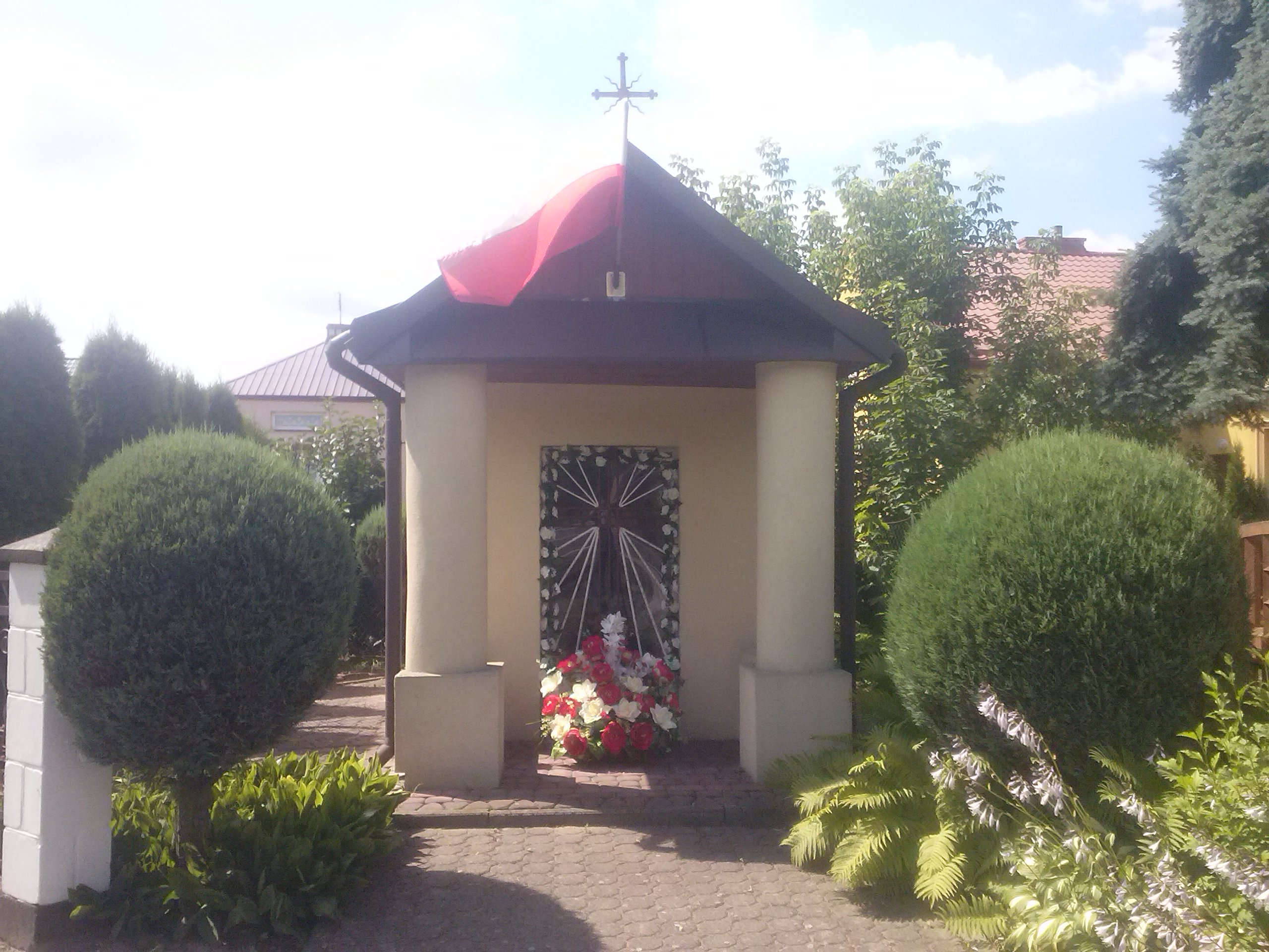 Kapliczka Matki Bożej w Wierzawicach